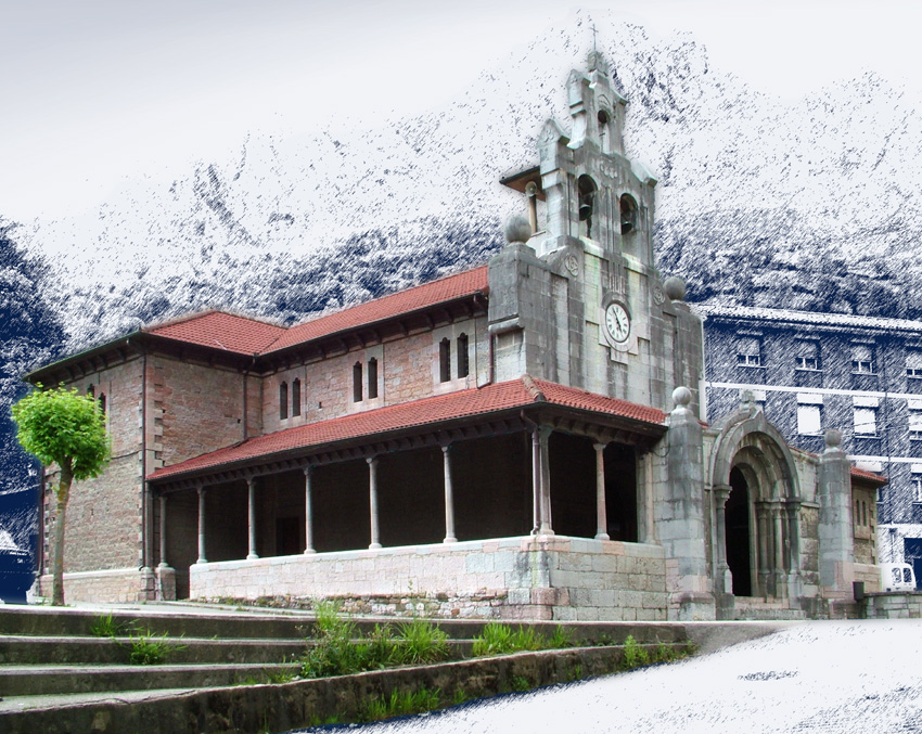 Iglesia de la parroquia de San Antonio de la Foz; La Foz de Morcín